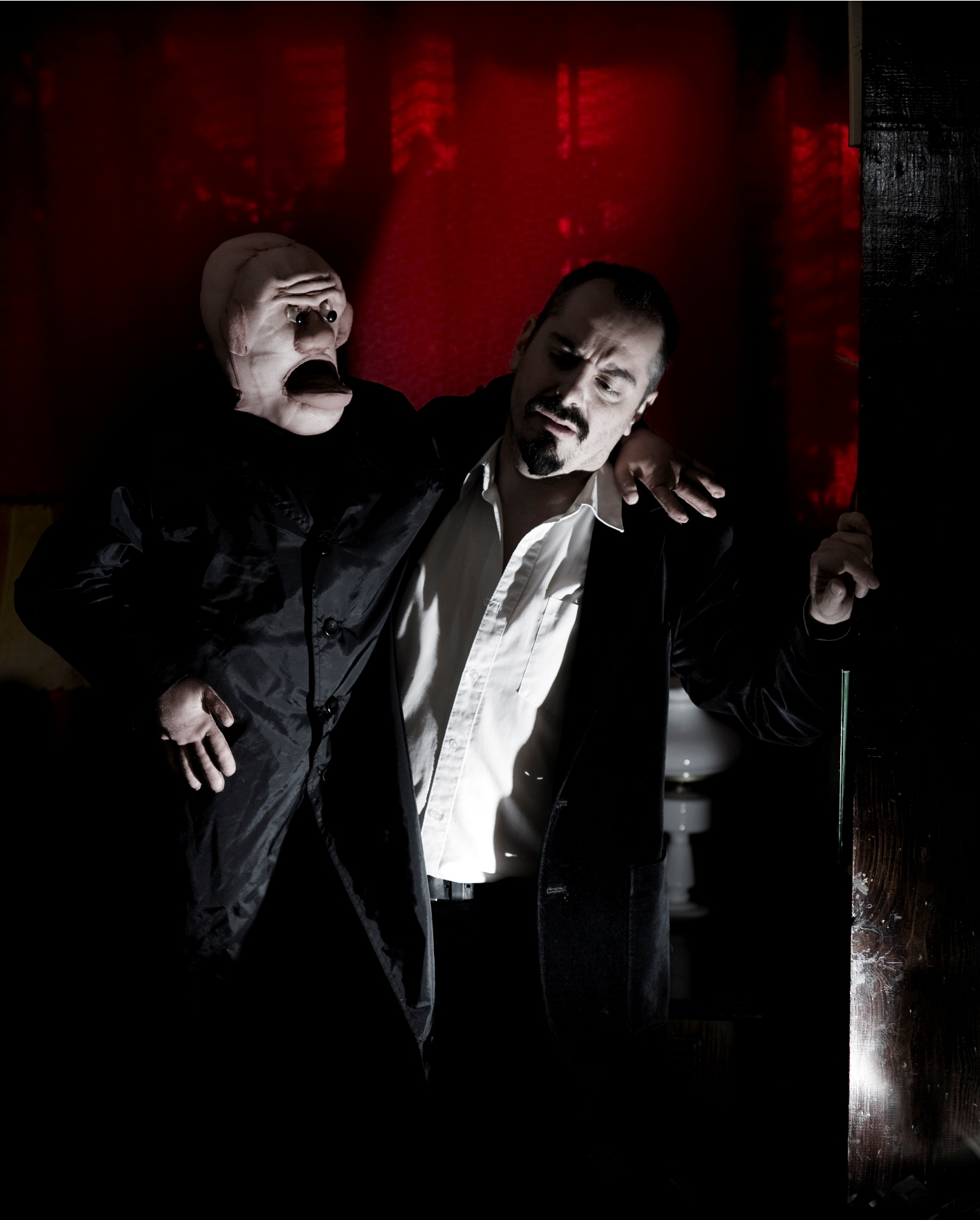 Mogács Dániel és fellépőtársa doktor Mogács. Budapest.